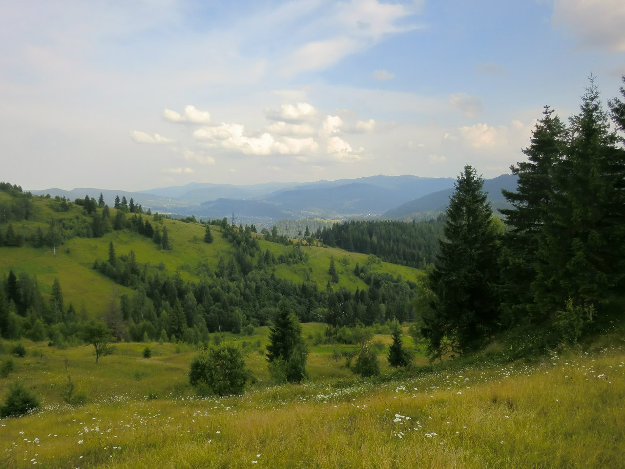 Карпатський, Яремчанська міська рада, Верховинський район, Надвірнянський район